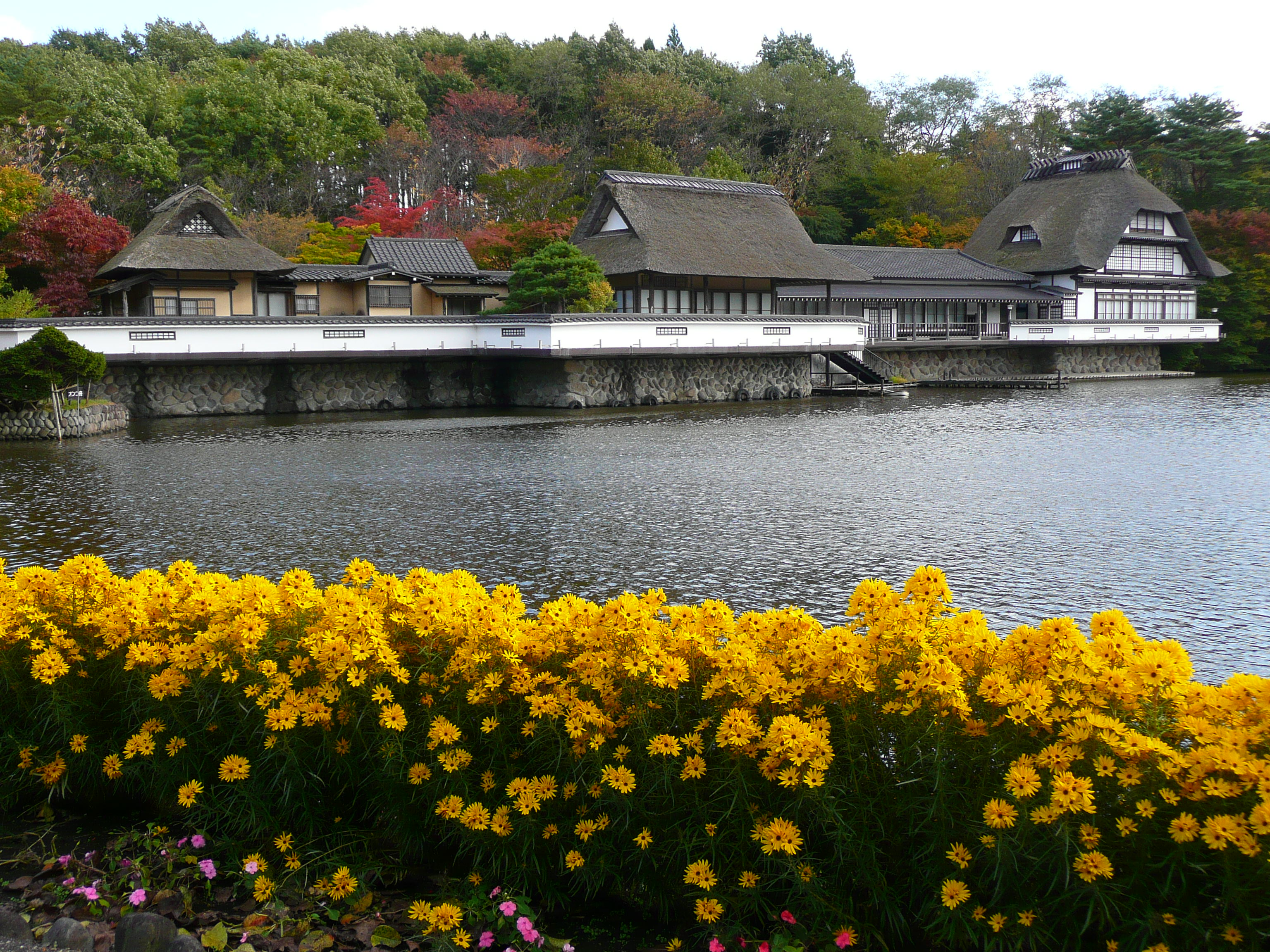 舊澀澤邸 Old Shibusawa Mansion